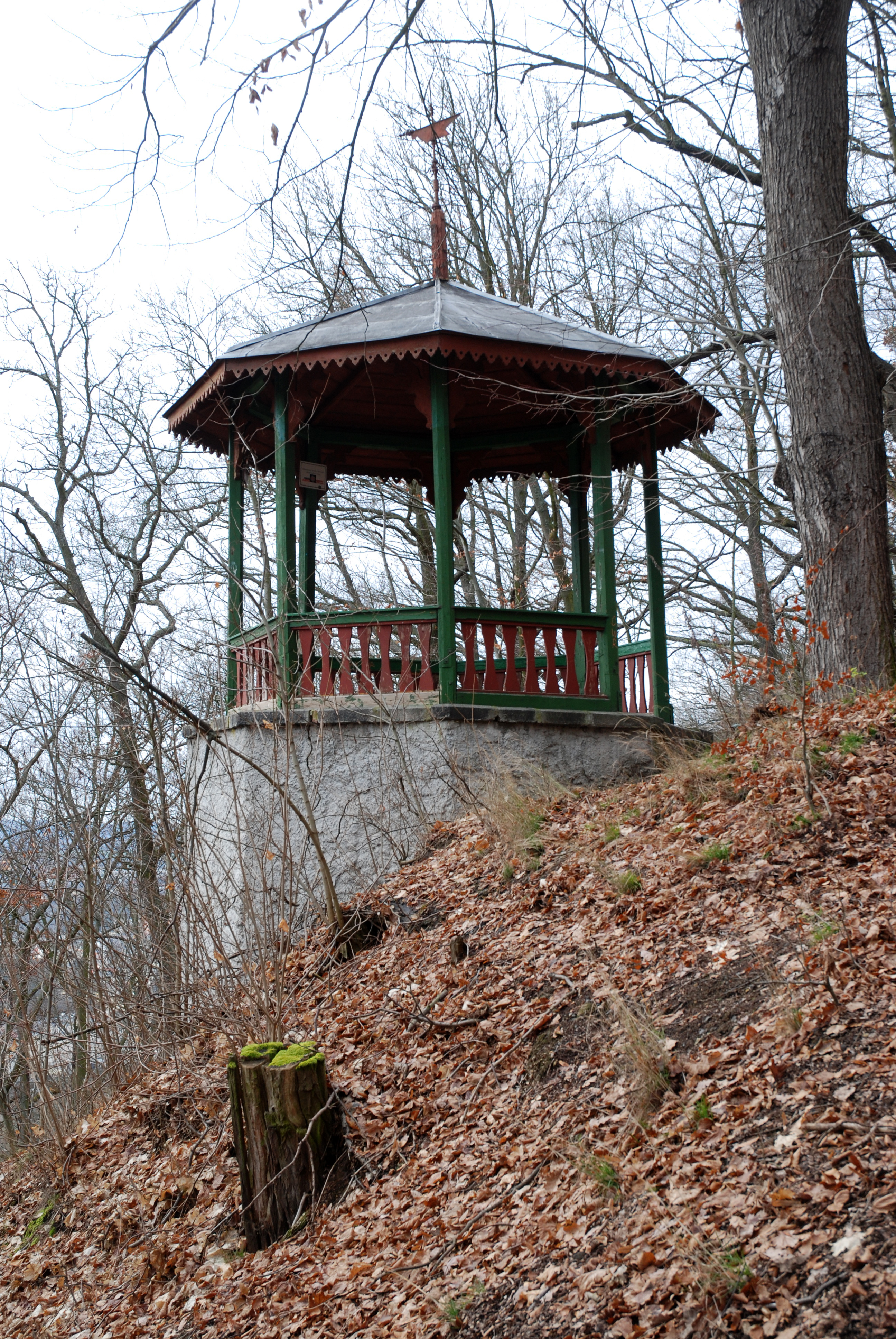 Altán Panorama v lázeňských lesích v Karlových Varech